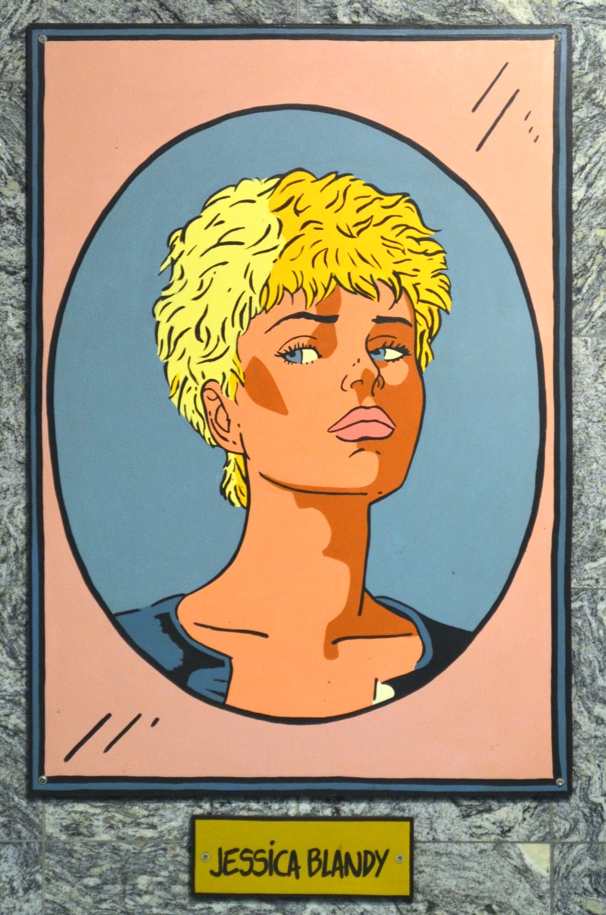 Charleroi (Belgique) - Station Janson du métro léger. Jessica Blandy.